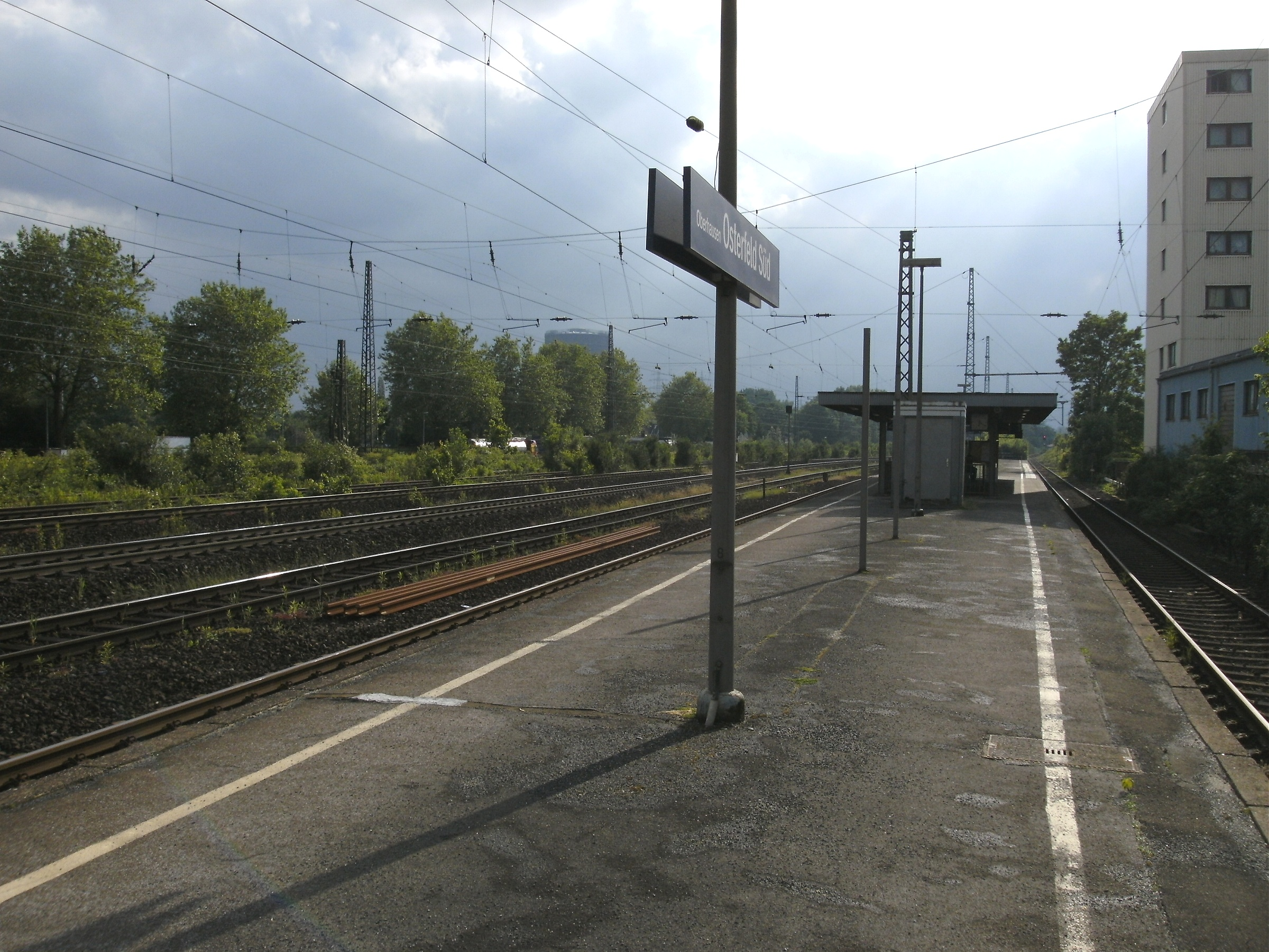 Bahnhof Oberhausen Osterfeld-Süd